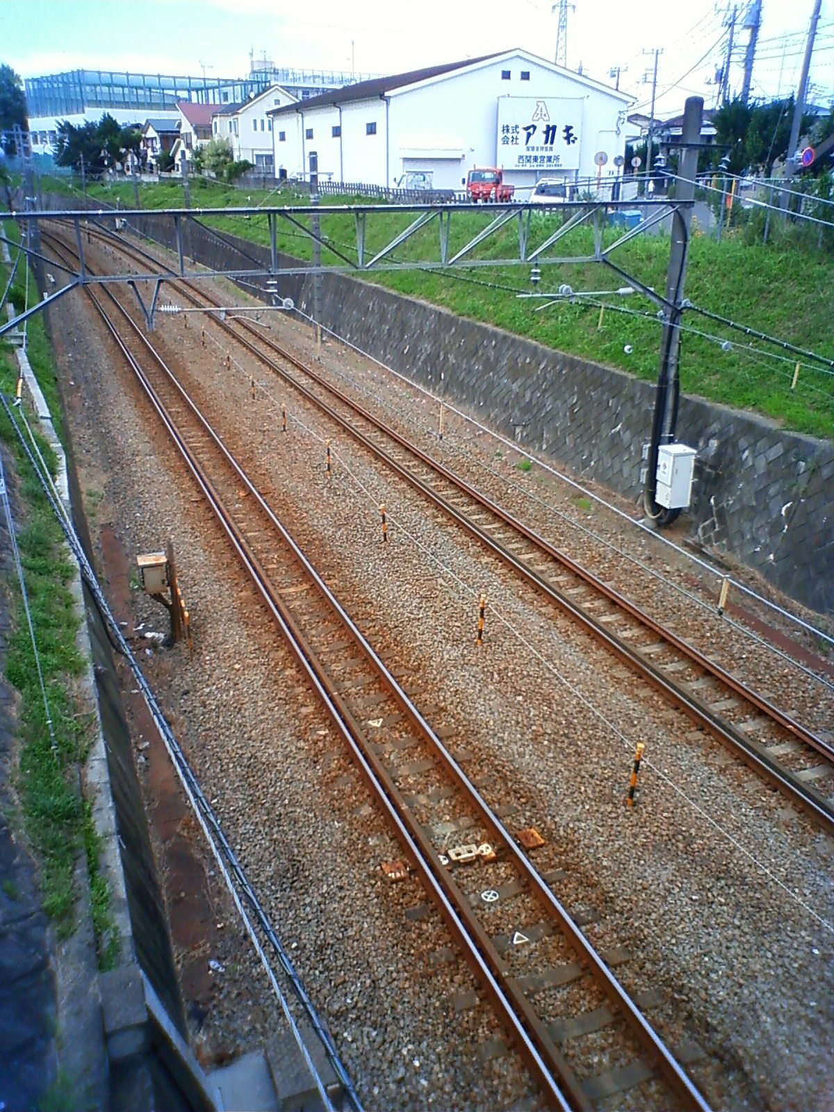 旧西府駅の存在した付近